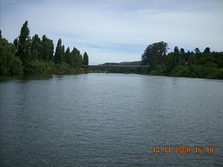 d b nacto